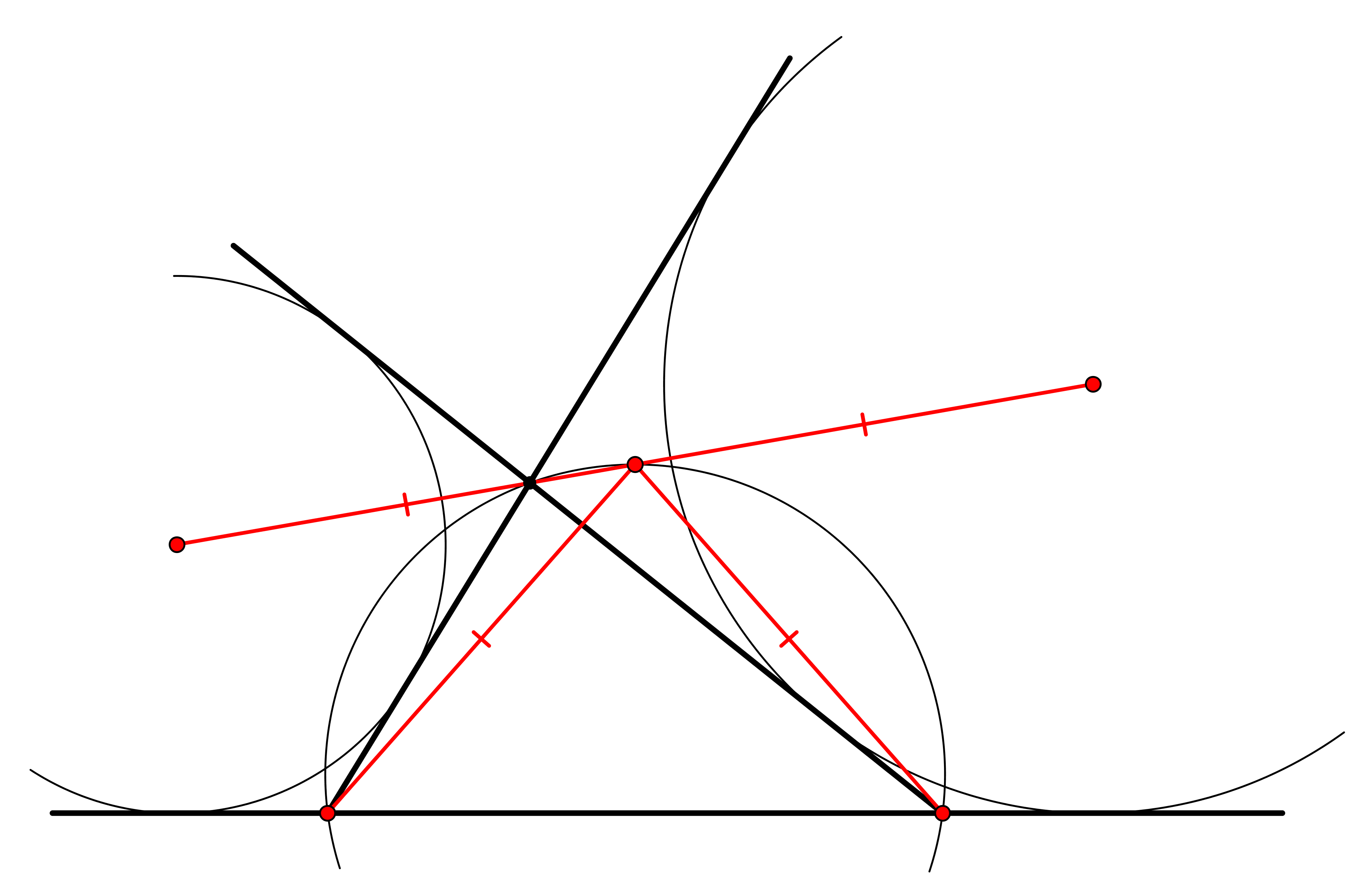 трезубец вариация